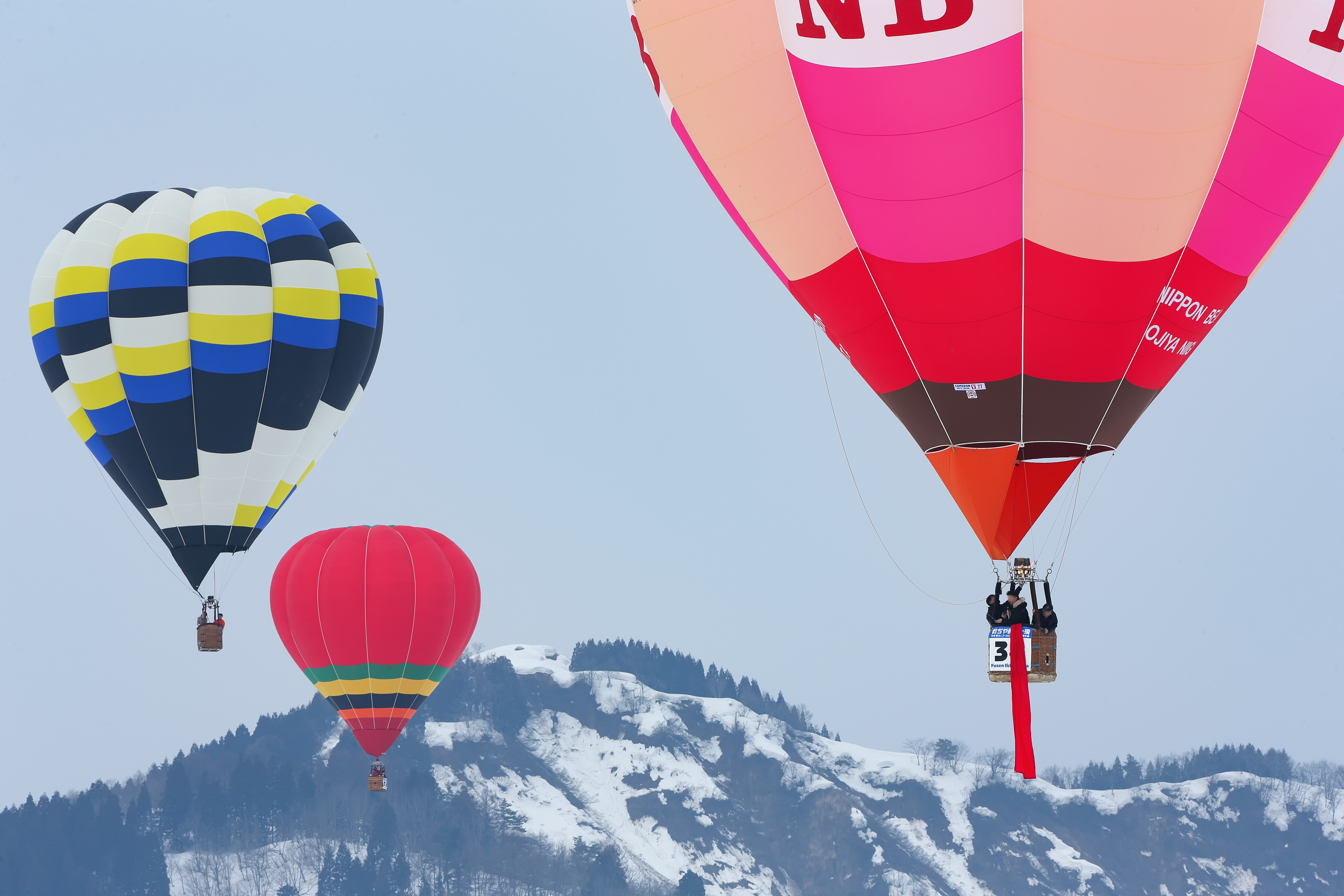 2015年に実施された、日本海カップ・クロスカントリー選手権（おぢや風船一揆）でのタスクの状況。 右側にいる赤色の布を垂らした気球がヘア気球で、競技者より前に離陸し、ターゲットを設定する。